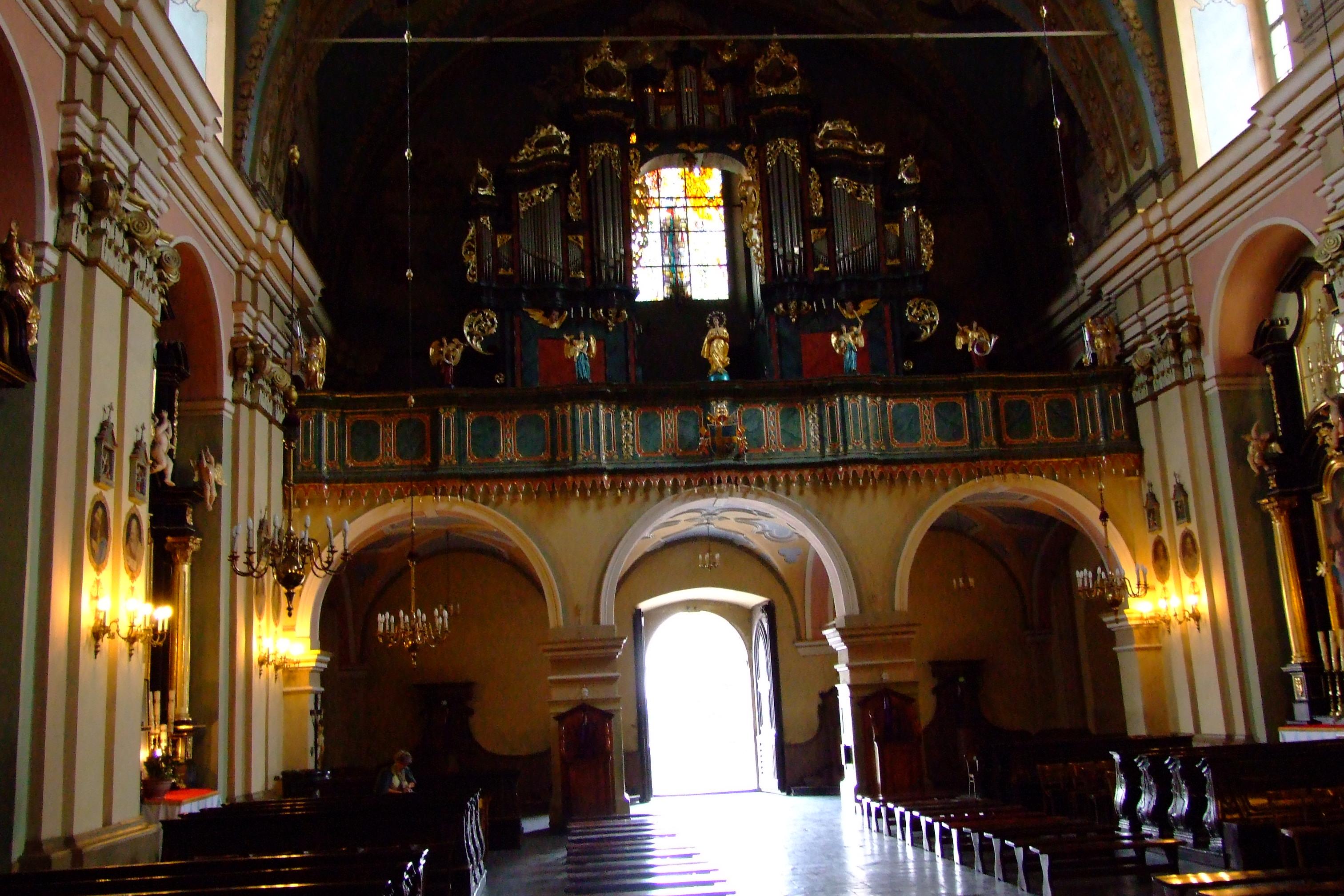 Sanktuarium pasyjno-maryjne w Kalwarii Zebrzydowskiej